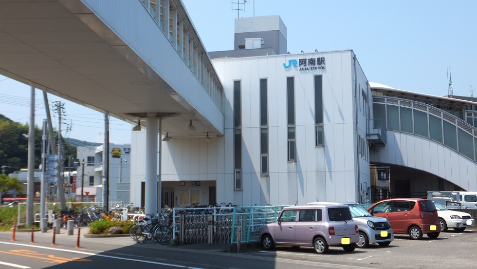 徳島県阿南市の阿南駅 （東口）